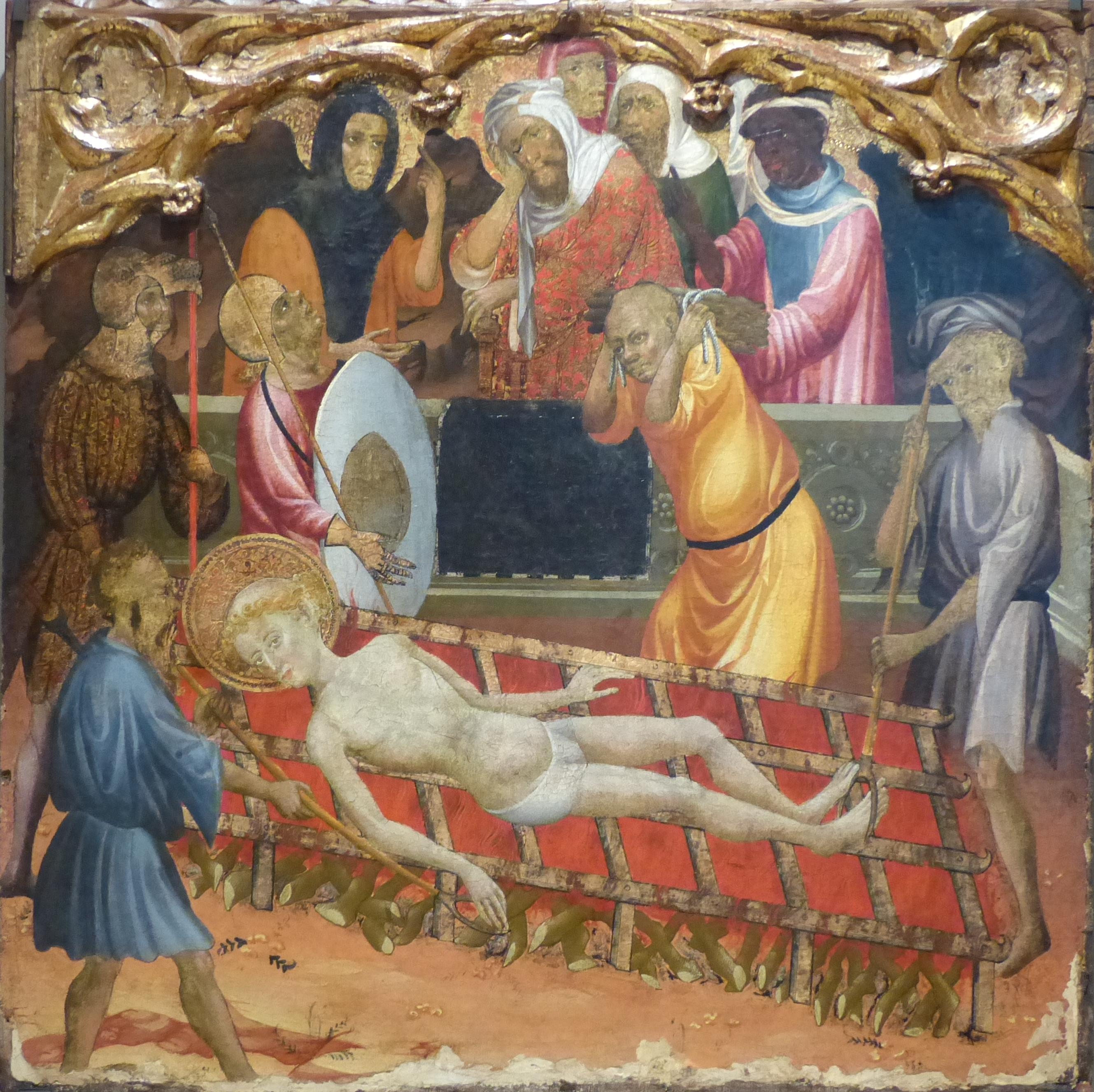 Perpignan (Pyrénées-Orientales, France), musée Hyacinthe Rigaud, collection peinture religieuse; panneau de retable peint par Miquel Alcanyis (école valencienne) représentant Le Martyre de Saint Vincent et datant de la première moitié du XVe siècle; peinture à la détrempe et fond d'or sur bois; dépôt du musée du Louvre depuis 1957.